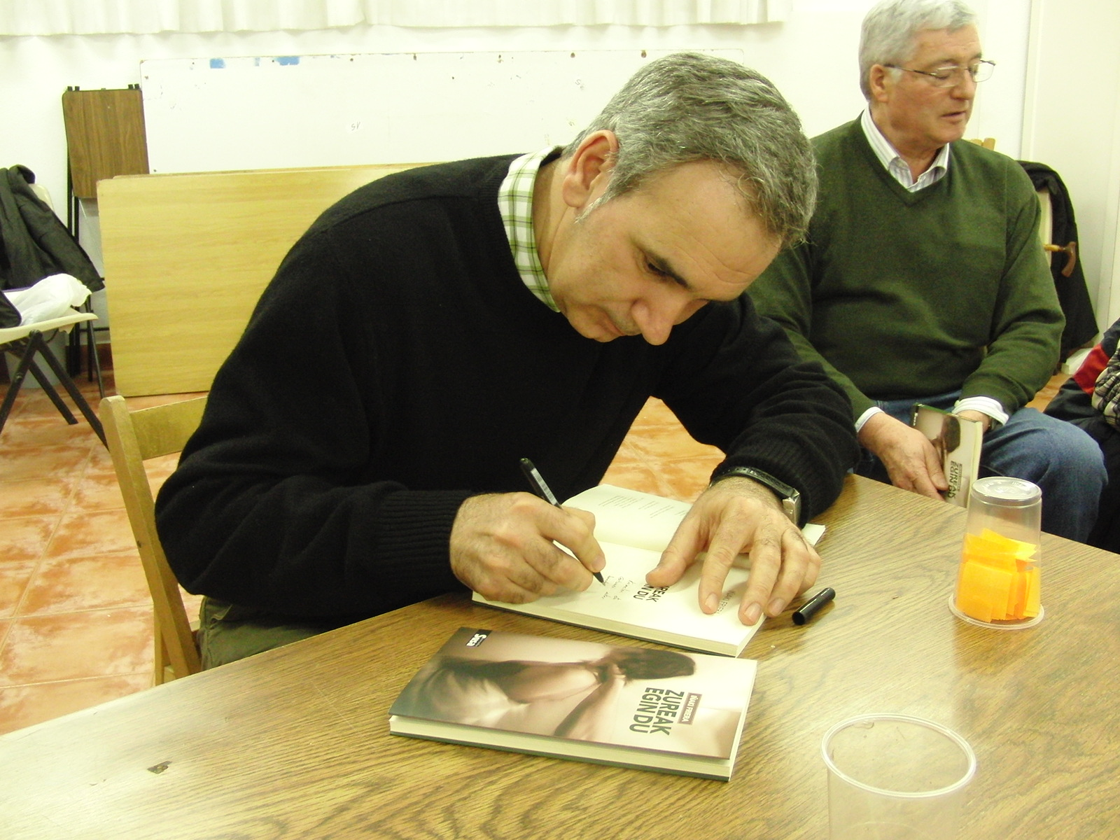 Iñaki Friera idazlea 2010ean.